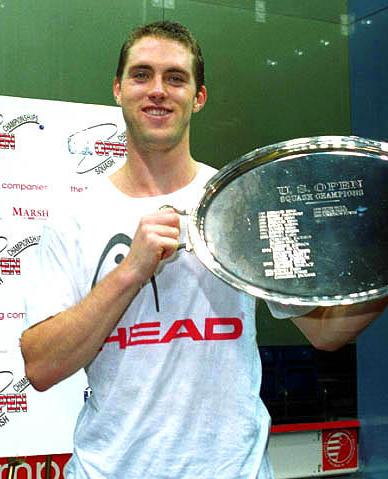 David Palmer US Open Trophy